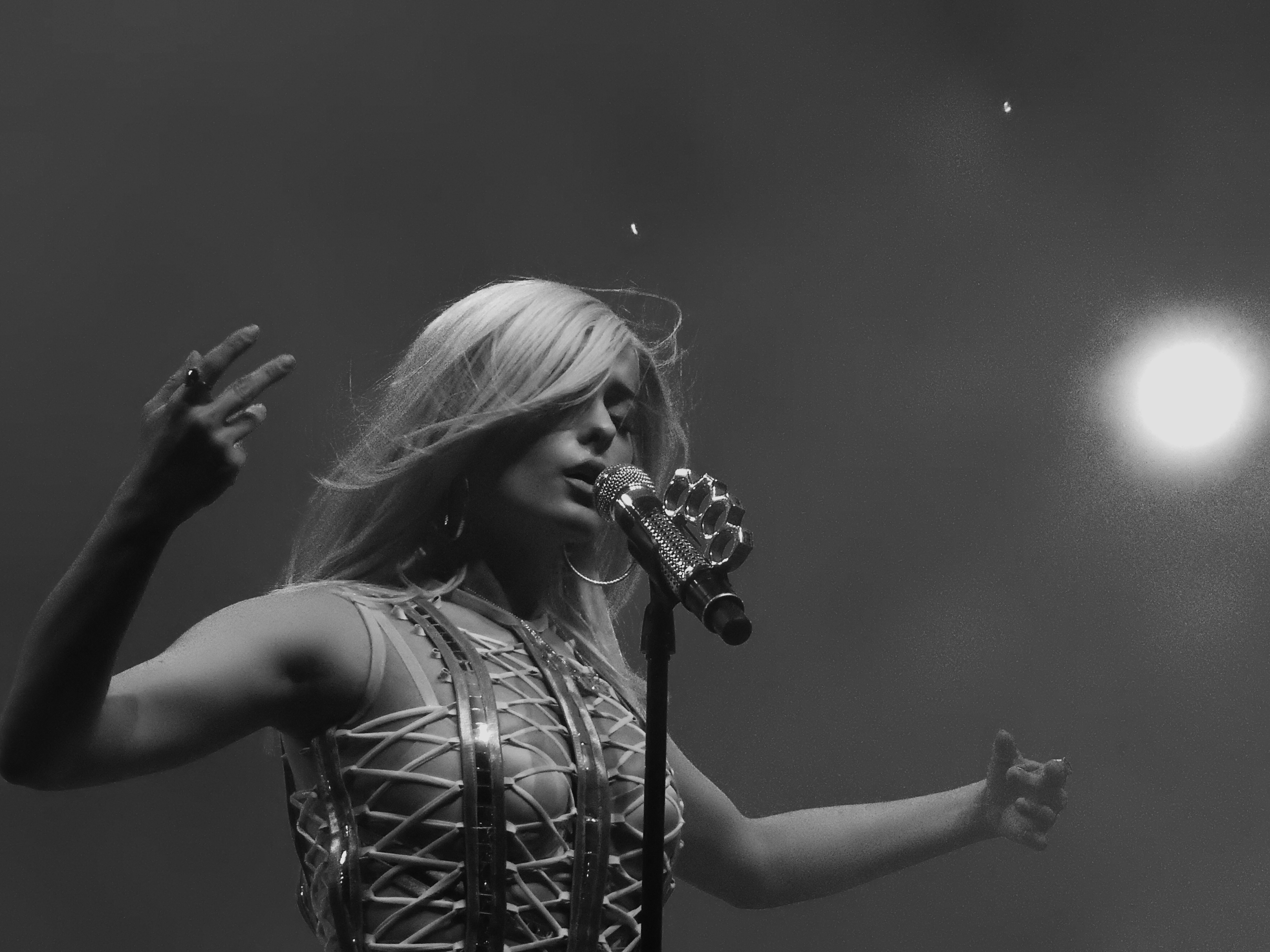 Bebe Rexha, Koko, London